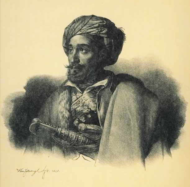 Makriyiannis or Makrigiannis (Μακρυγιάννης) (1794 - 1864), Greek merchant, politician and warrior, hero of the Greek War of Independence. Μακρυγιάννης Lithography by Karl Krazeisen (1794-1878) from "Bildnisse ausgezeichneter Griechen und Philhellenen nebst einigen Ansichten und Trachten. Nach der Natur gezeichnet und herausgegeben von Karl Krazeisen. Munchen 1831".